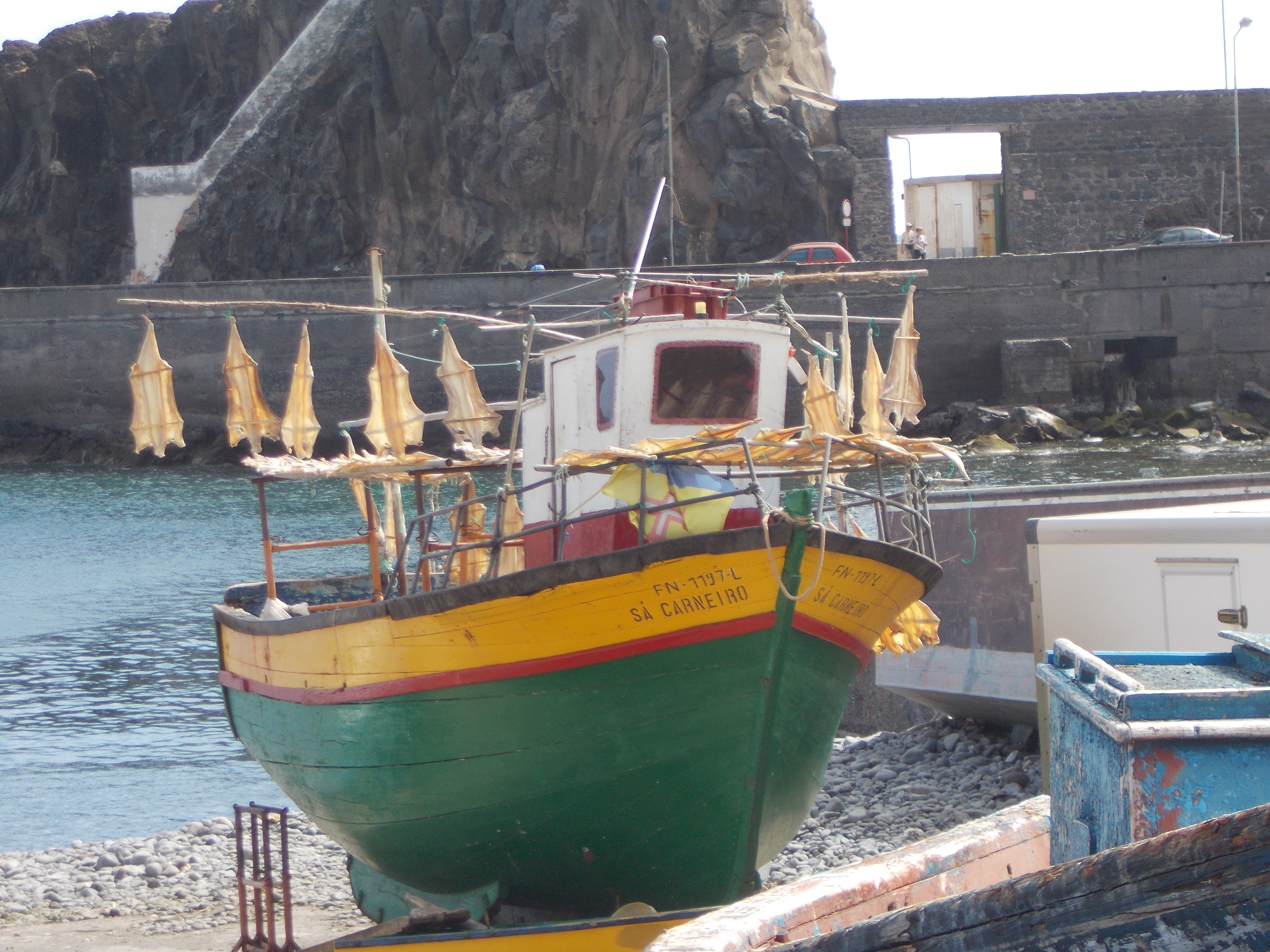 Suszenie dorsza tradycyjnym sposobem w Camare de Lobos na Maderze.